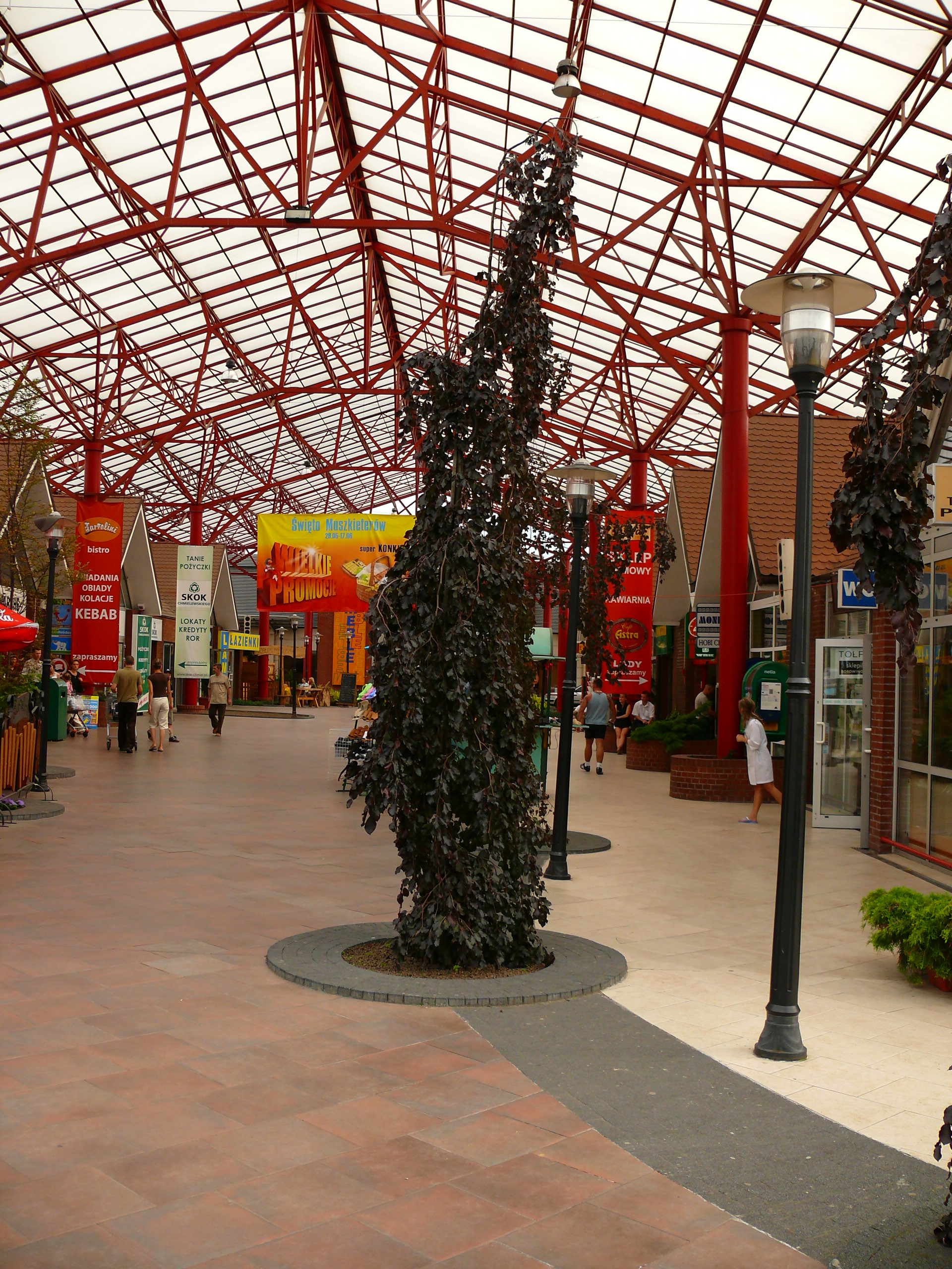 Fagus sylvatica 'Purpurea Pendula'